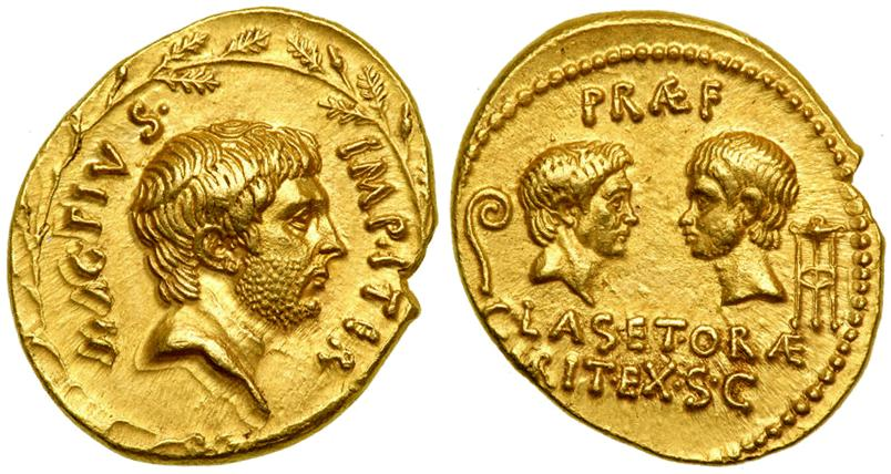 Aureus des Sextus Pompeius, 42-40 v. Chr. geprägt in Sizilien (8,39g); Vorderseite mit Porträt des Sextus Pompeius im Kranz aus Eichenlaub und Aufschrift MAG(ni filius) PIUS IMP(erator) ITER. Revers mit Aufschrift PRAEF(ectus) CLAS(sis) ET ORAE MARIT(imae) EX S(enatus) C(onsulto) und Profilen des verstorbenen Vaters Gnaeus Pompeius Magnus links und des verstorbenen Bruders Gnaeus Pompeius der Jüngere rechts. Links außen ein Lituus, rechts außen ein Dreifuß. Sammlerwert etwa 75.000 USD. Abbildung mit Genehmigung der Ira & Larry Goldberg Coins & Collectibles, Inc.